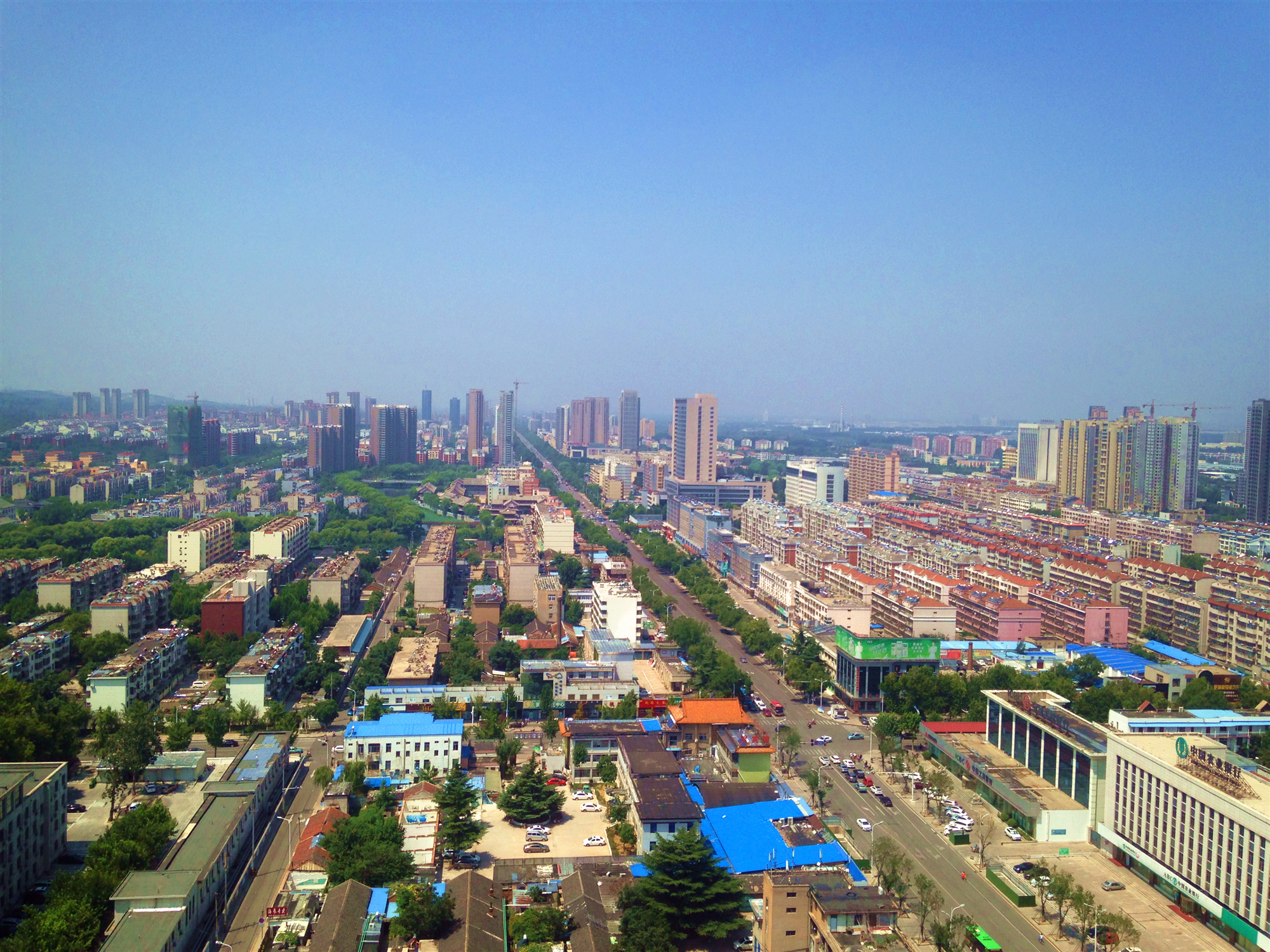 中文（中国大陆）: 俯瞰肥城市